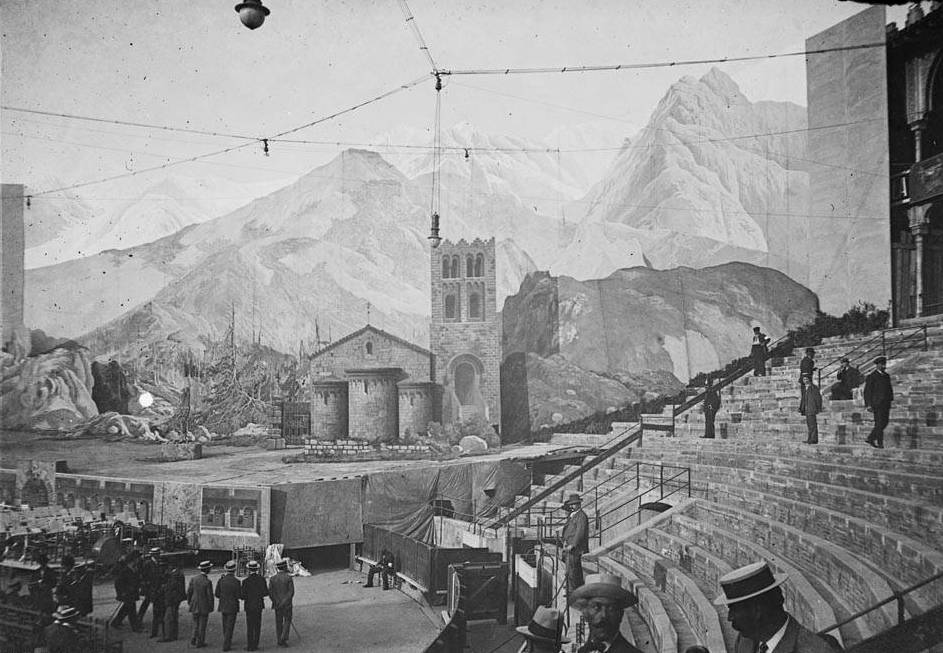 Imatge